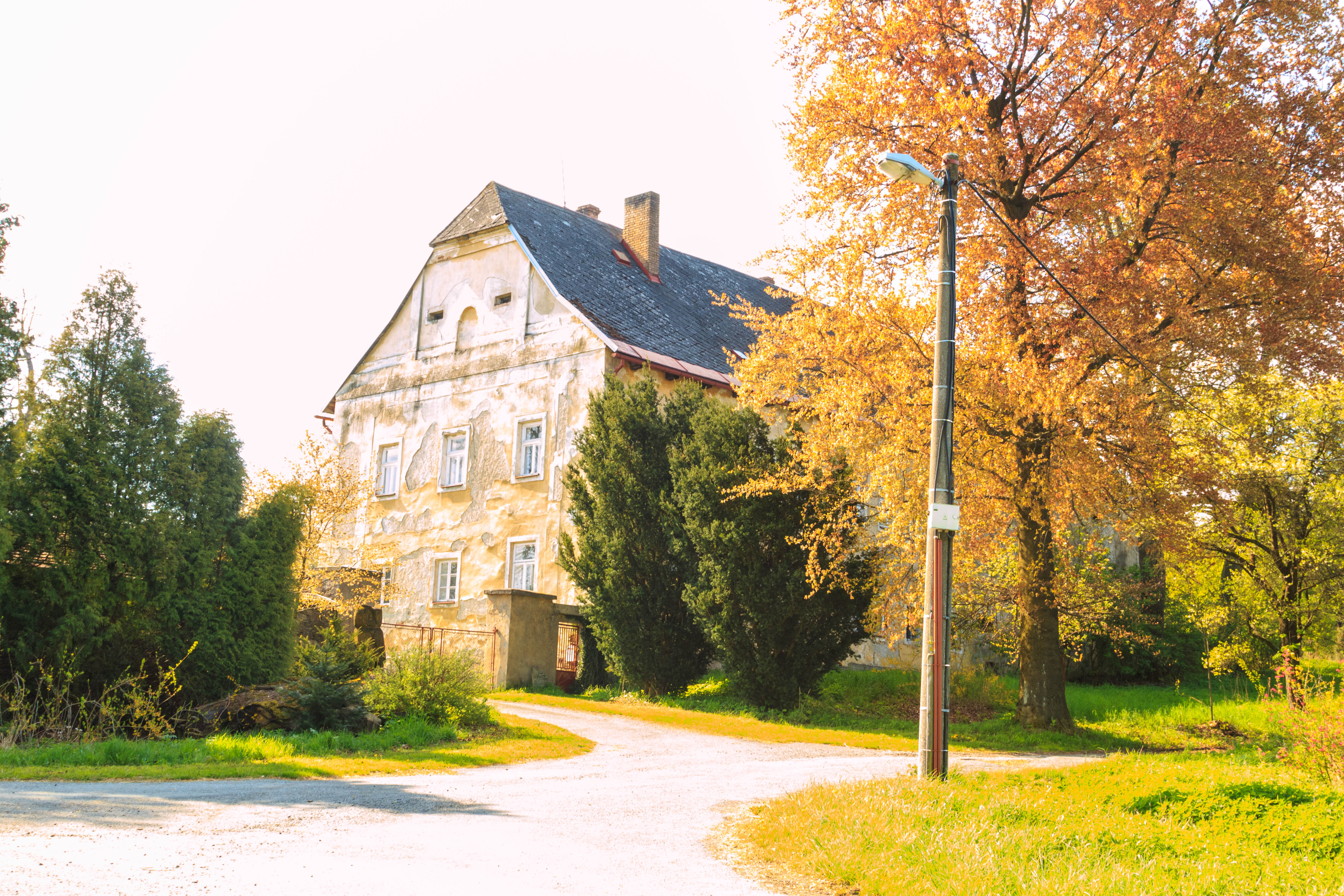 Čachnov bývalý zámeček